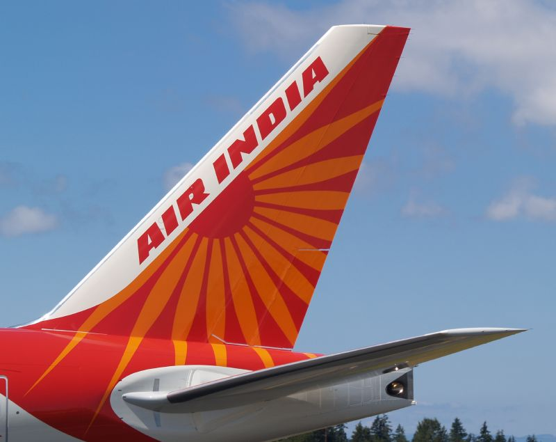 Air India B777-200LR VT-ALA